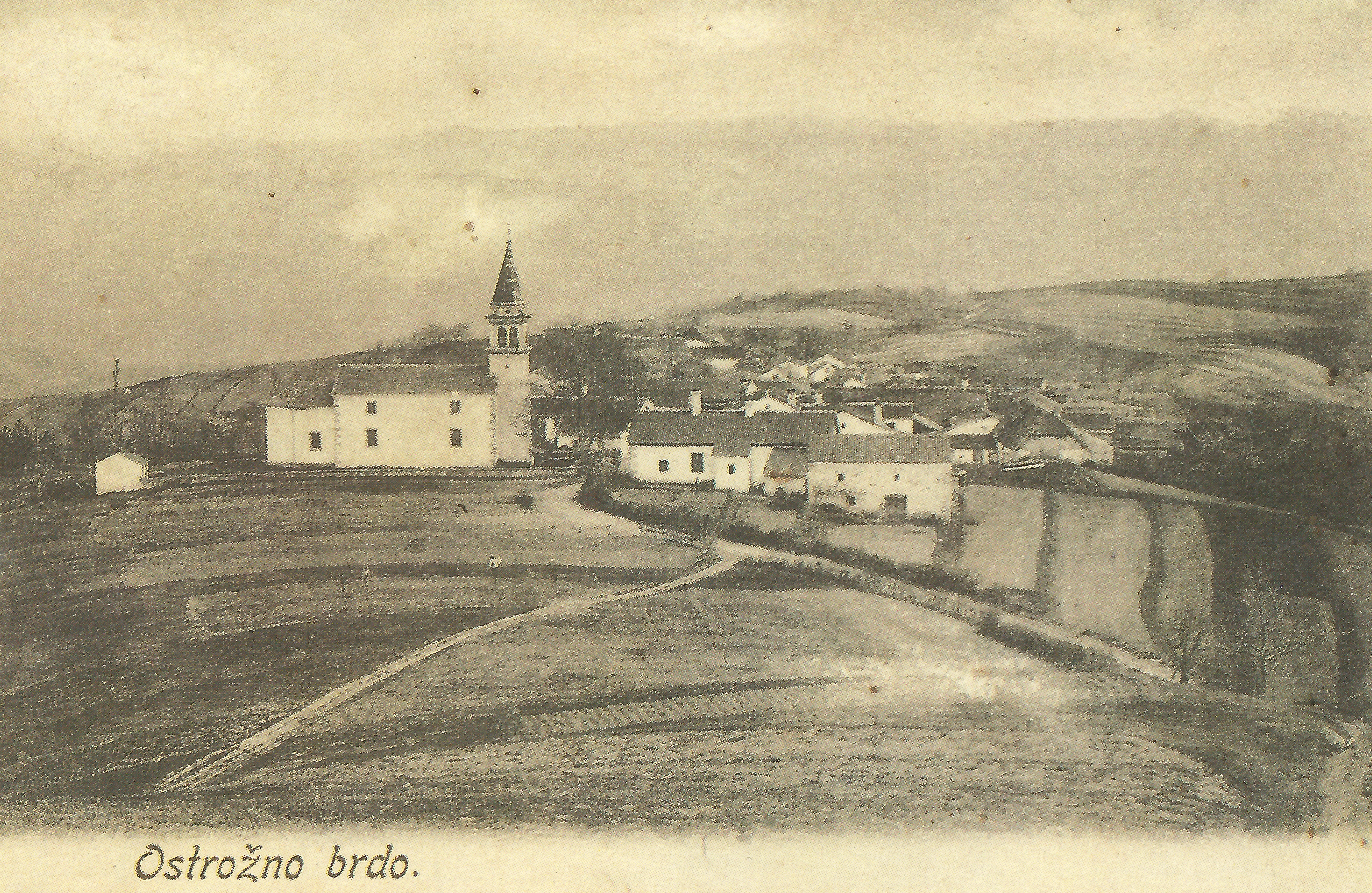 Razglednica Ostrožnega Brda.